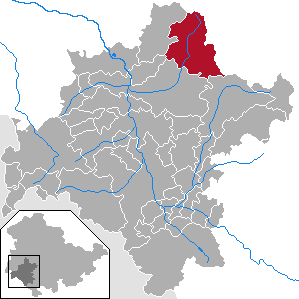 Floh-Seligenthal in Thuringia - District Schmalkalden-Meiningen